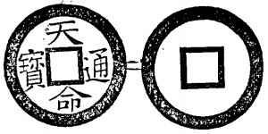 天命通宝钱币图样，出自刊于1895年的《Currency of the farther East》（远东古钱币）第二卷，该书作者为十九世纪末在香港任职的J.H. Stewart Lockhart（骆克）。“天命通宝”钱是后金首任君主努尔哈赤在位的天命年间铸行的货币。